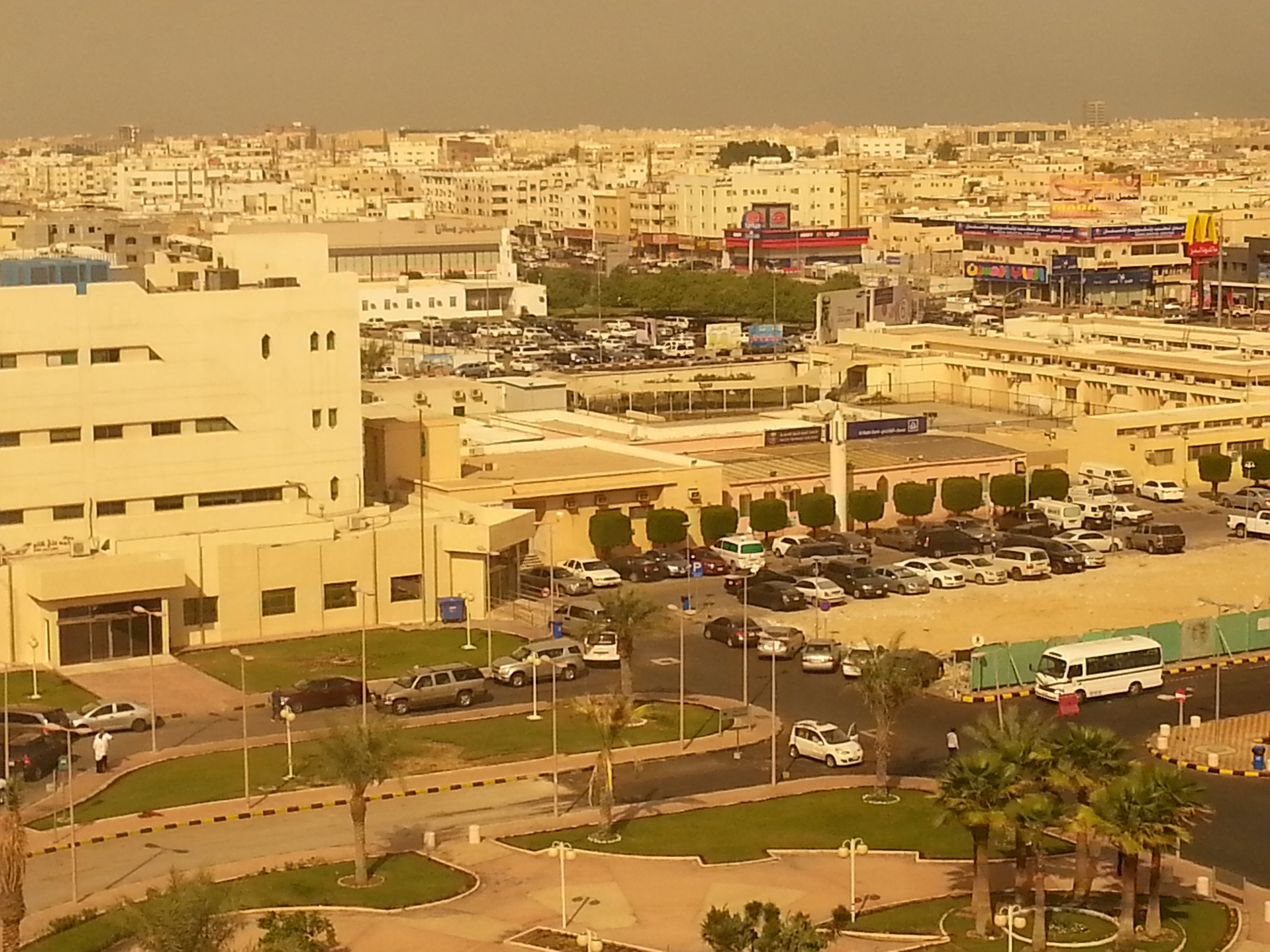 Dammam medical complex